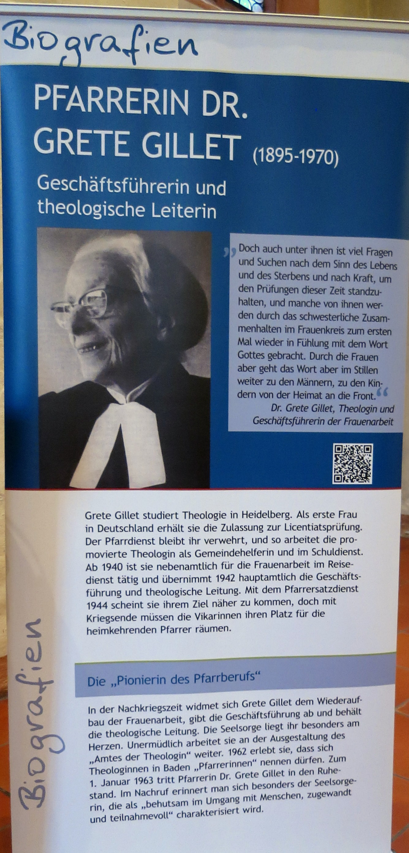 Roll-up einer Ausstellung zum Thema "100 Jahre Evangelische Frauen in Baden"